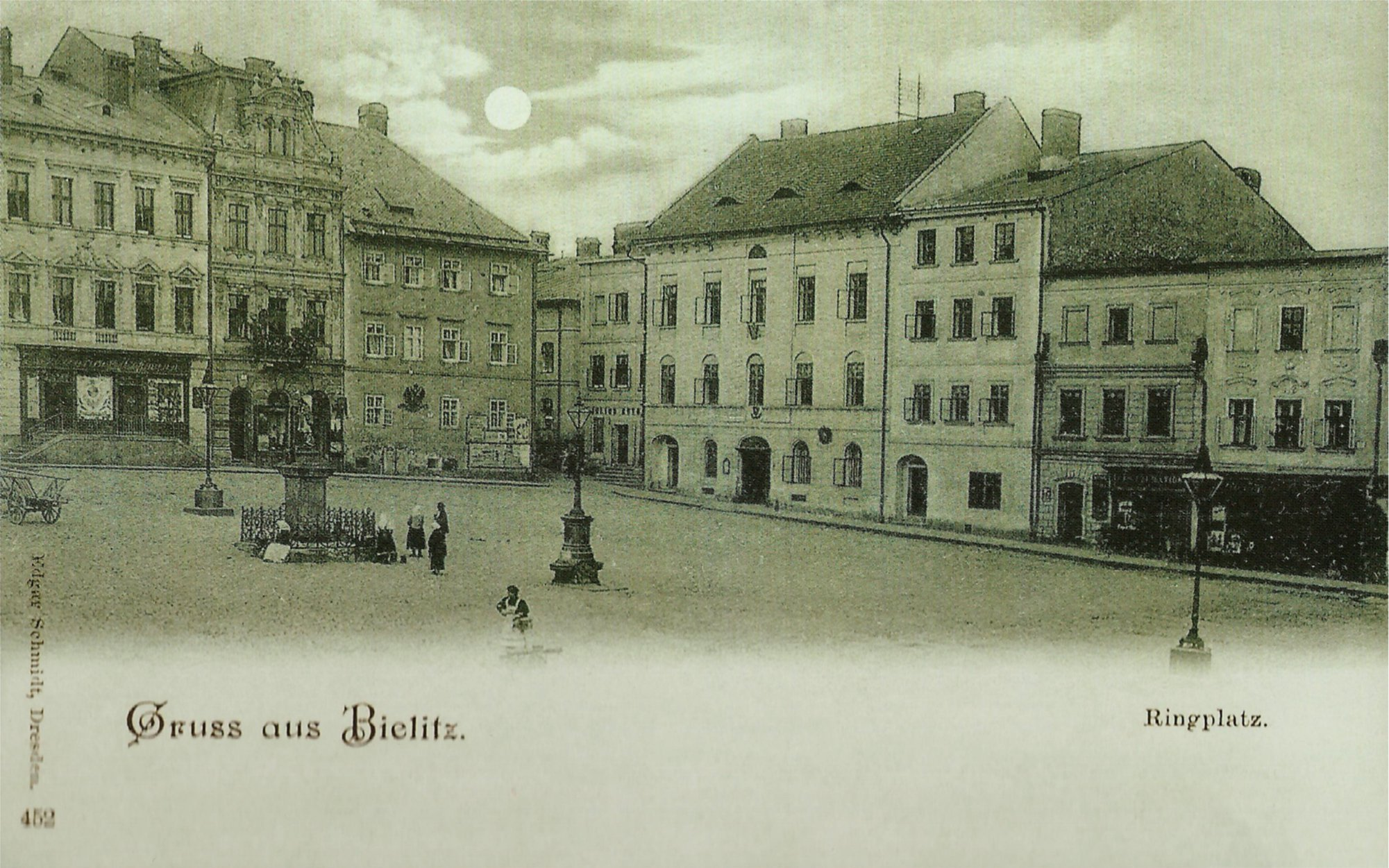 Rynek w Bielsku-Białej, północno-zachodni narożnik Rynku